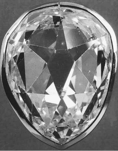 Le diamant Sancy exposé dans la galerie d'Apollon au musée du Louvre depuis 1979.